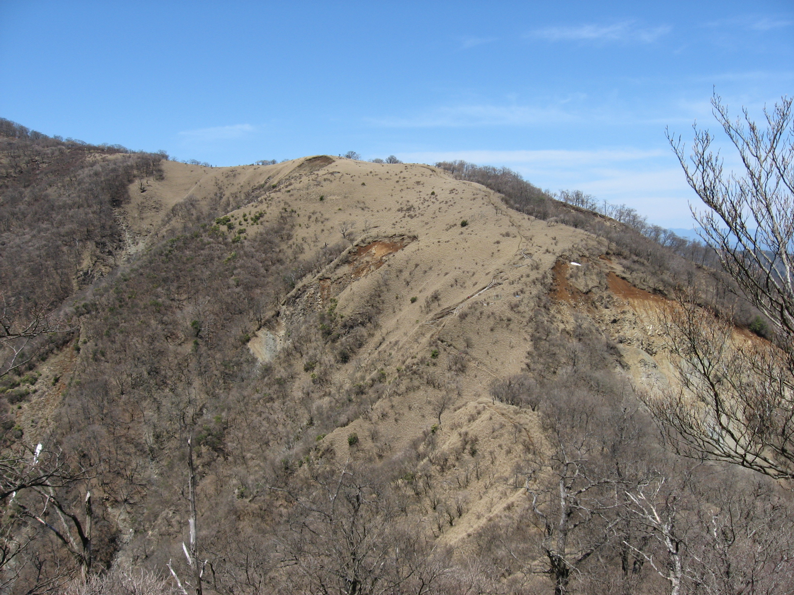 箒杉沢ノ頭